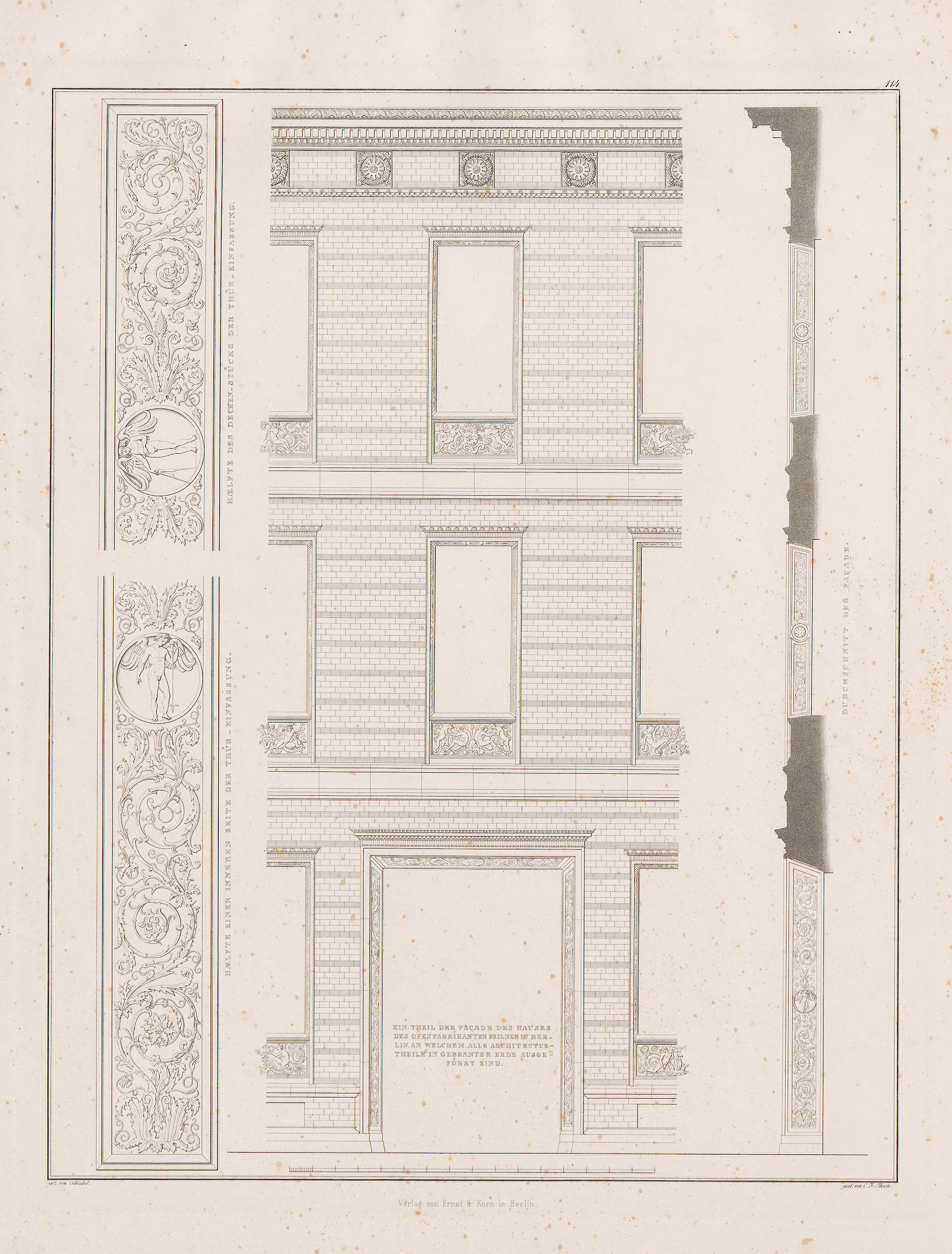 Feilnerhaus Berlin, Fassadenentwurf von Schinkel